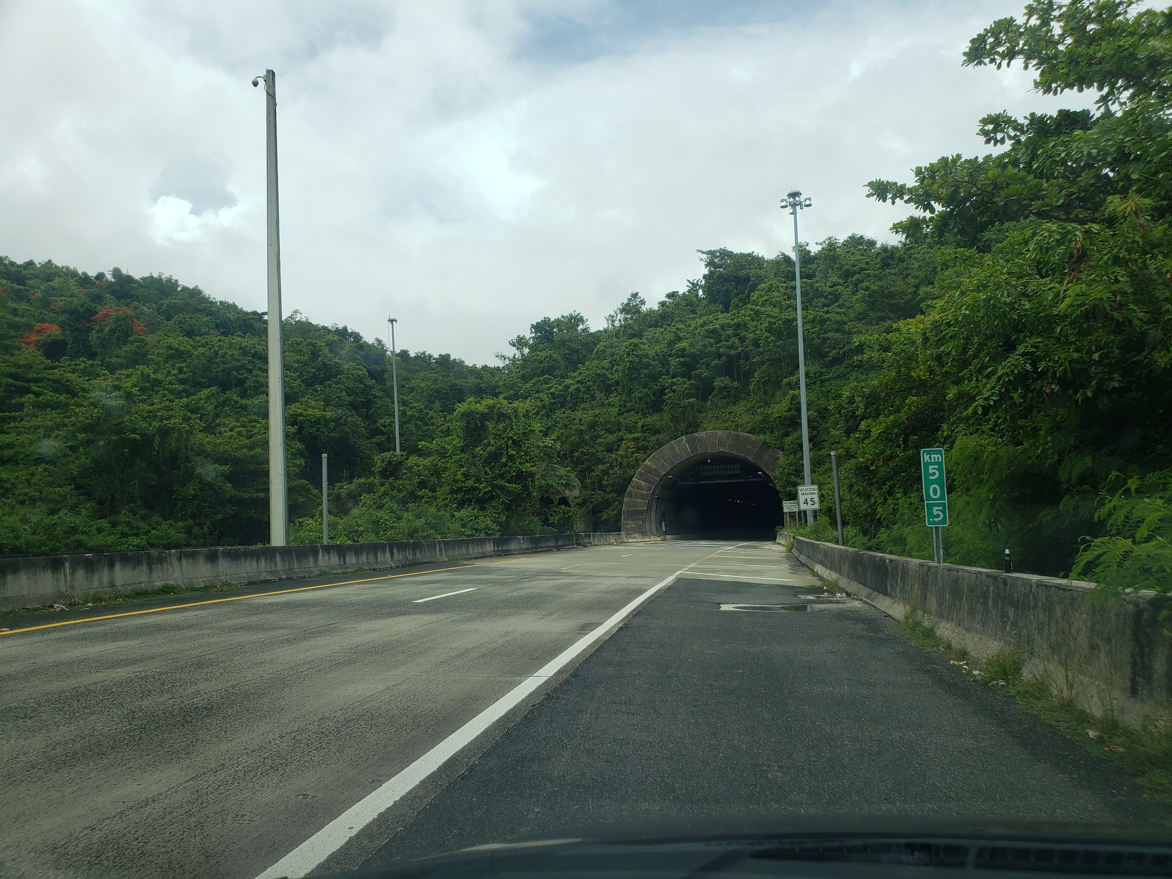 Túnel Vicente Morales Lebrón en Emajagua, Maunabo